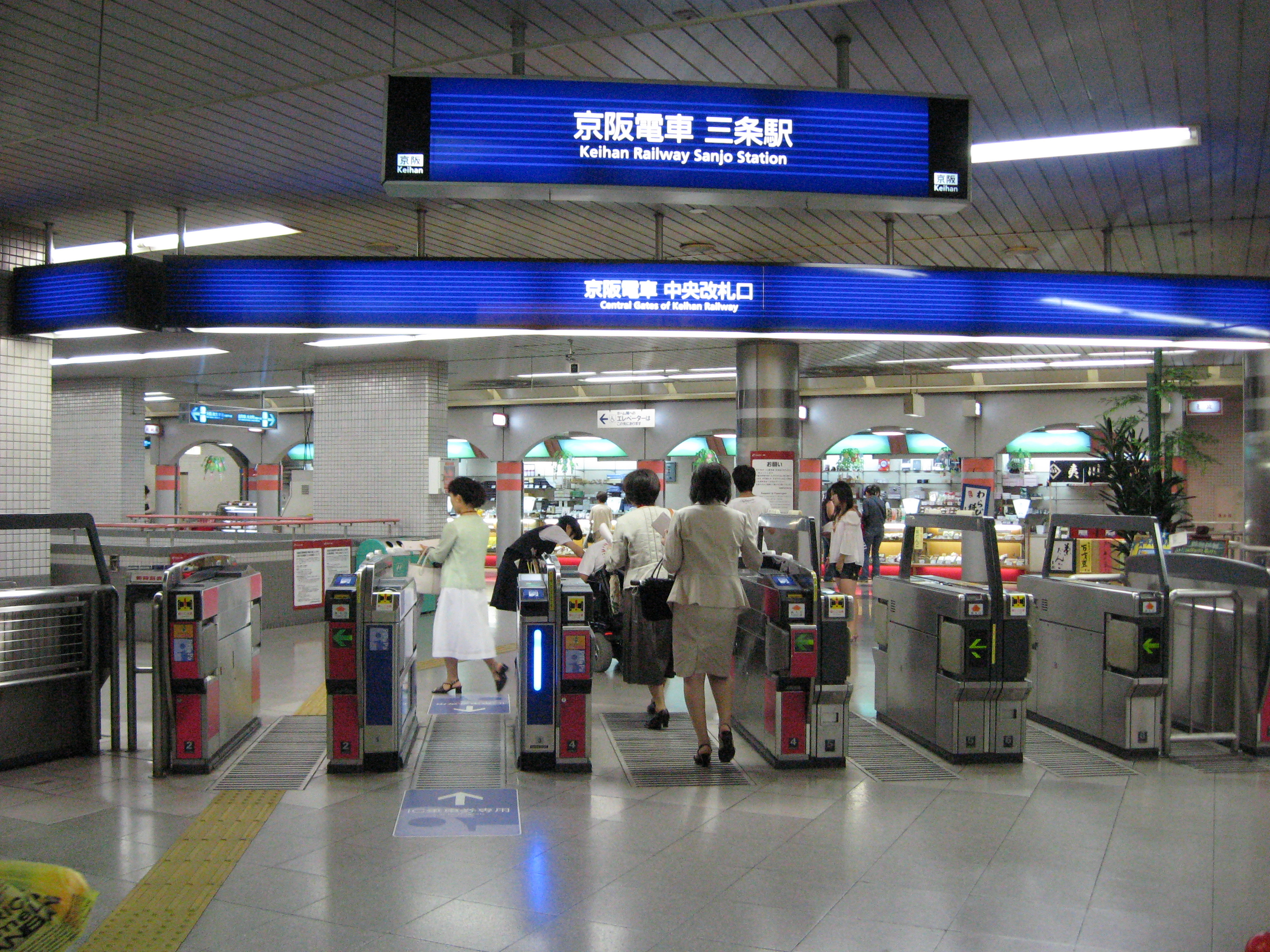 Keihan Sanjo Station Ticket Gate